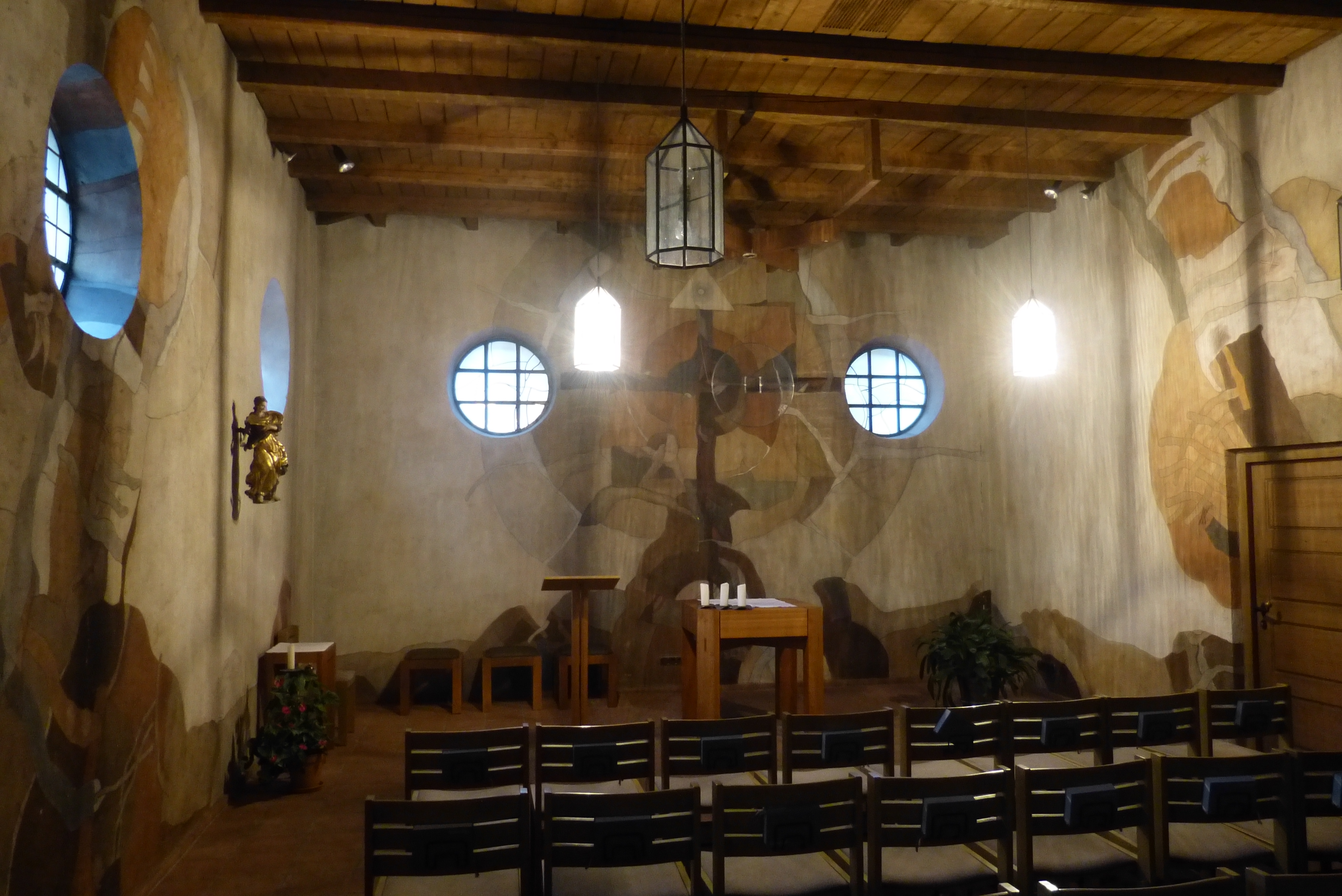 Seitenkapelle in der Kirche Heiligste Dreifaltigkeit (Augsburg-Kriegshaber), gestaltet von Georg Bernhard.